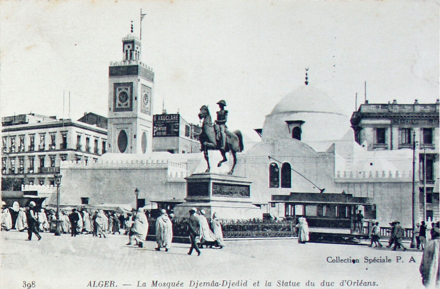 Carte postale Collection Spéciale P.A (poste aux armées?) expédiée en 1916 d'une série sur le département d'Alger.N° 298 la mosquée Djemäa-Djedid et statue du duc d'Orléans.